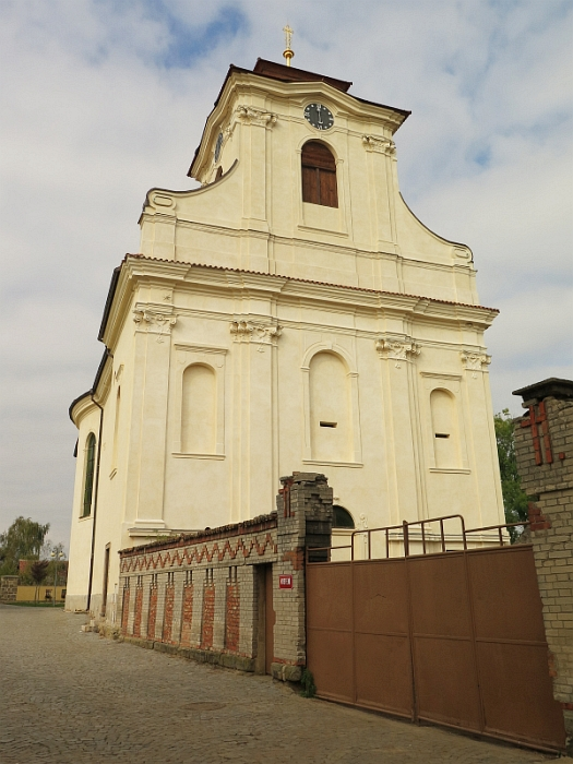 Kostel svaté Kateřiny, západně od náměstí T. G. Masaryka, Dolní Bousov.